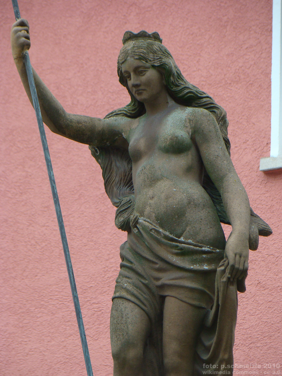 Fleinertorbrunnen in Heilbronn